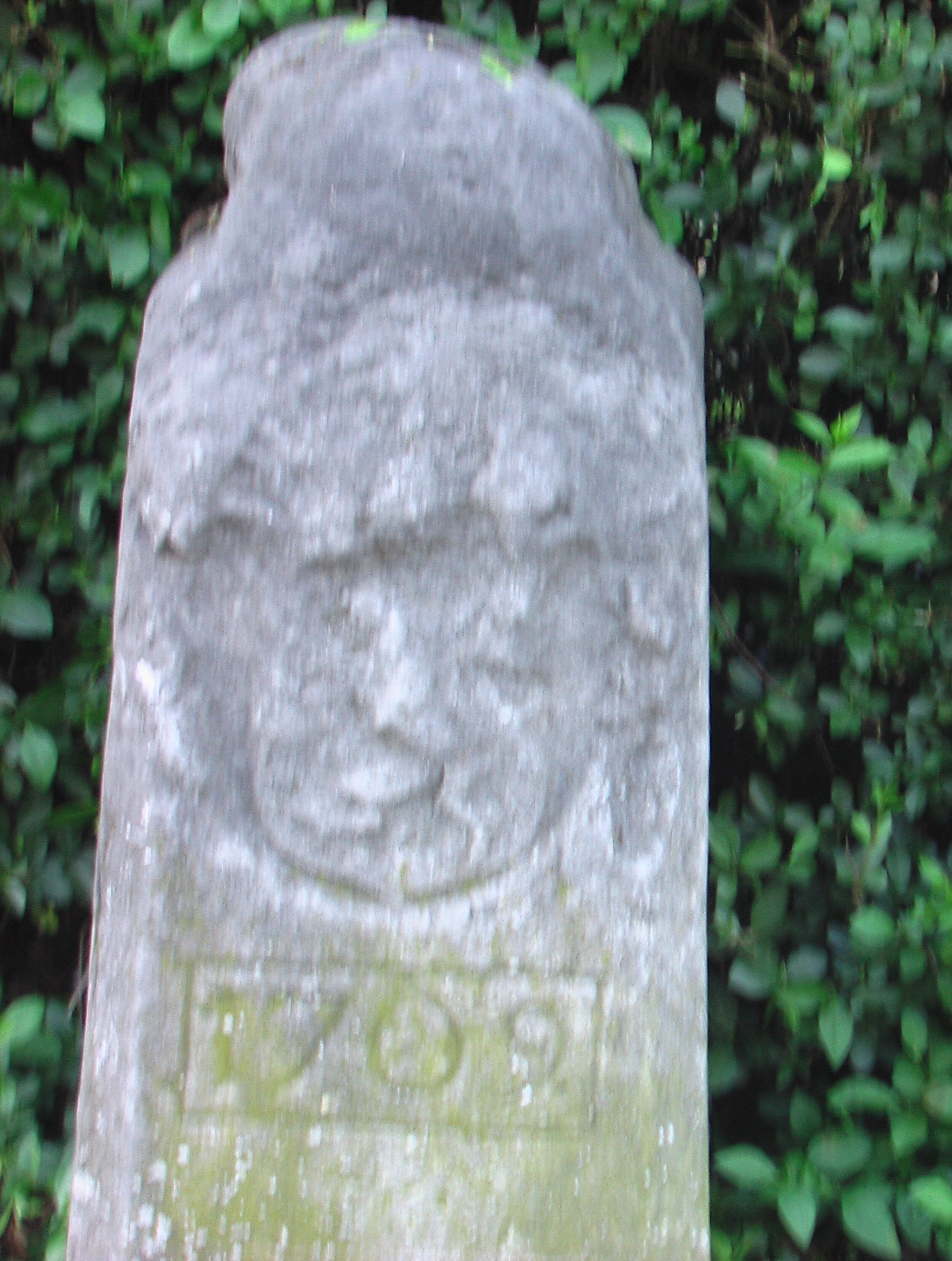 Mijlpaal 1709 aanleg Steenweg Brussel Leuven Kortenberg met schild Leeuw van Brabant